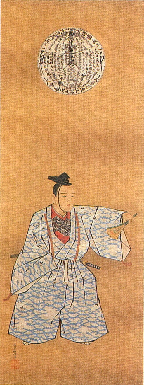 前田利保とされる画像(『前田利保公能舞三姿図』の一部)。